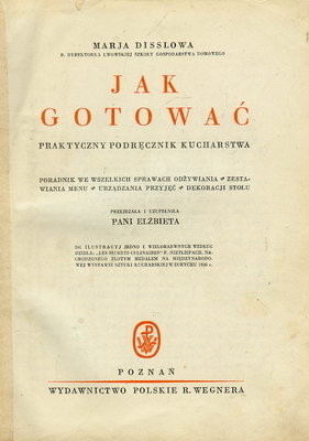 Strona tytułowa książki Marii Disslowej "Jak gotować", Wydawnictwo Polskie R. Wegner , lata 30. XX w.